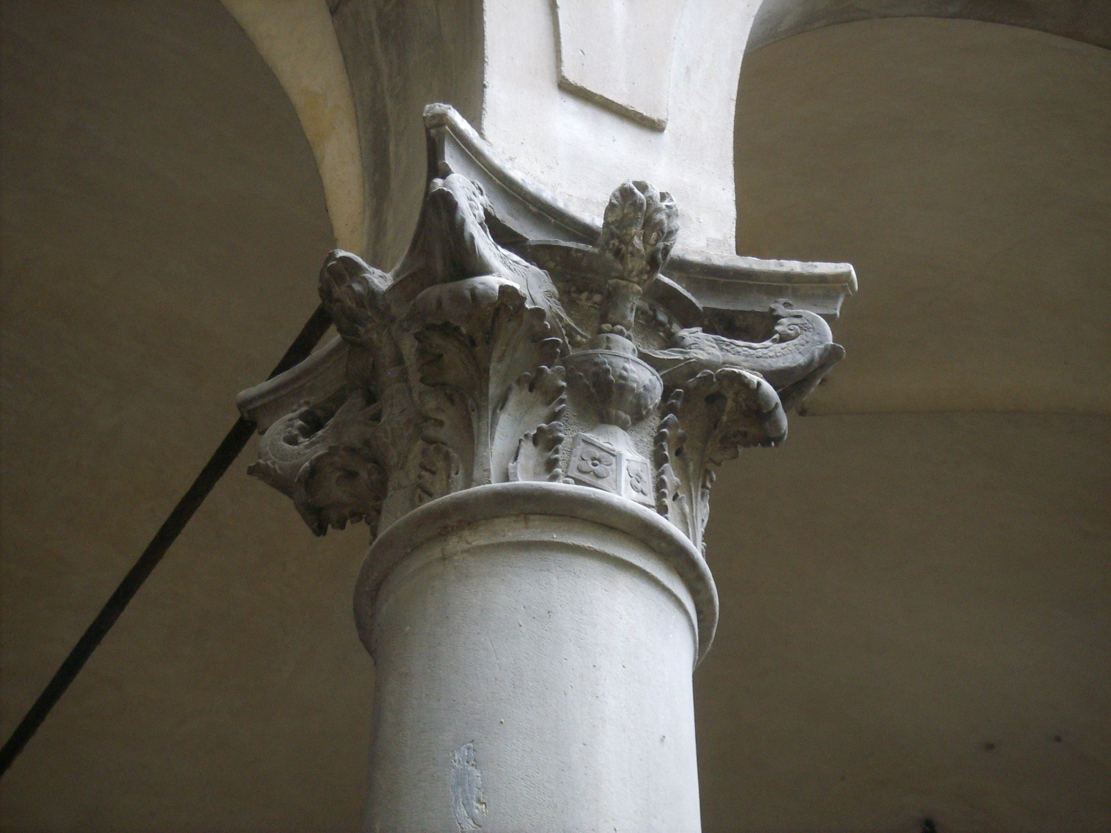 Palazzo pazzi quaratesi, capitello